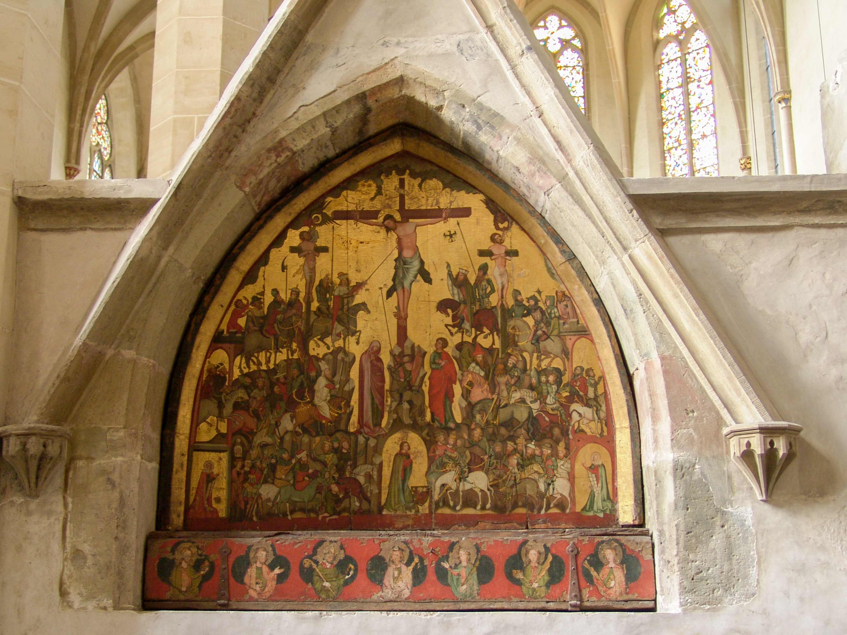 Predigerkirche in Erfurt